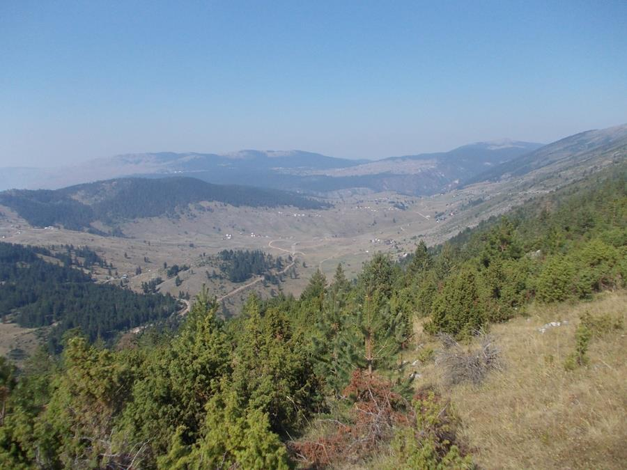 Pogled sa Lisca na Bobovo